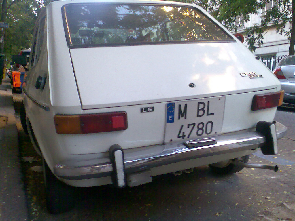 SEAT127 1976 4ºaoût 08 madrid009